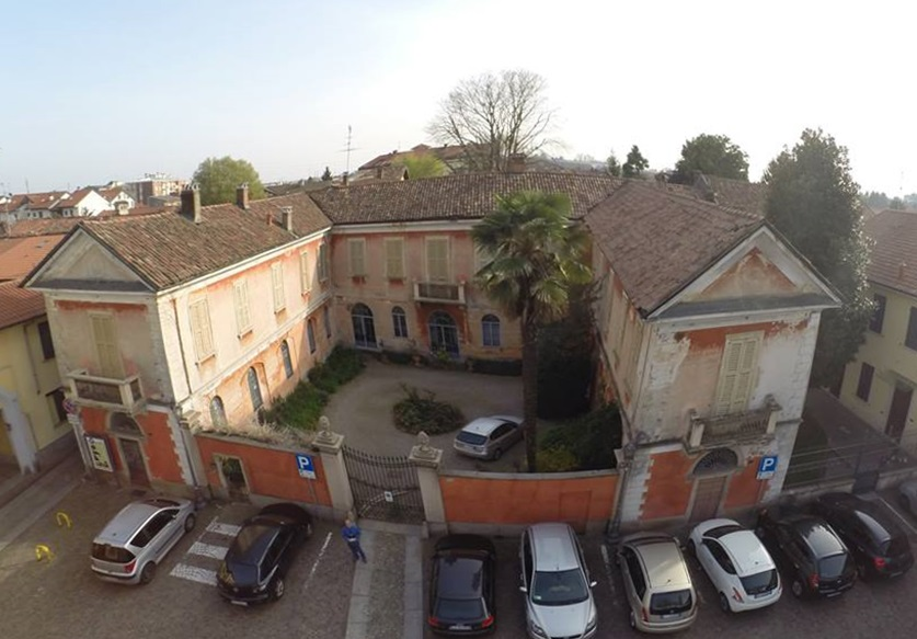 Palazzo Pestalozza Dal Verme dal drone di Francesco Garretta